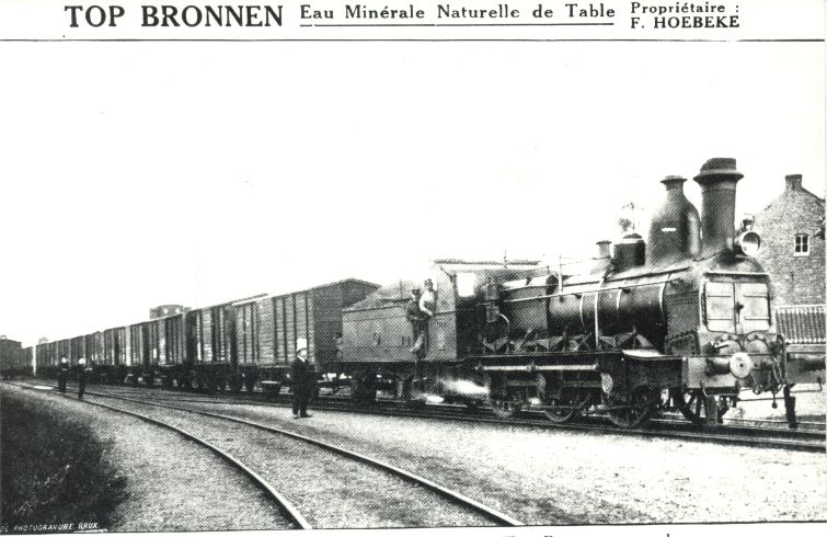 Een aftakking van de spoorlijn Zottegem-Ronse leidde naar de laadkaaien van de Top Bronnen